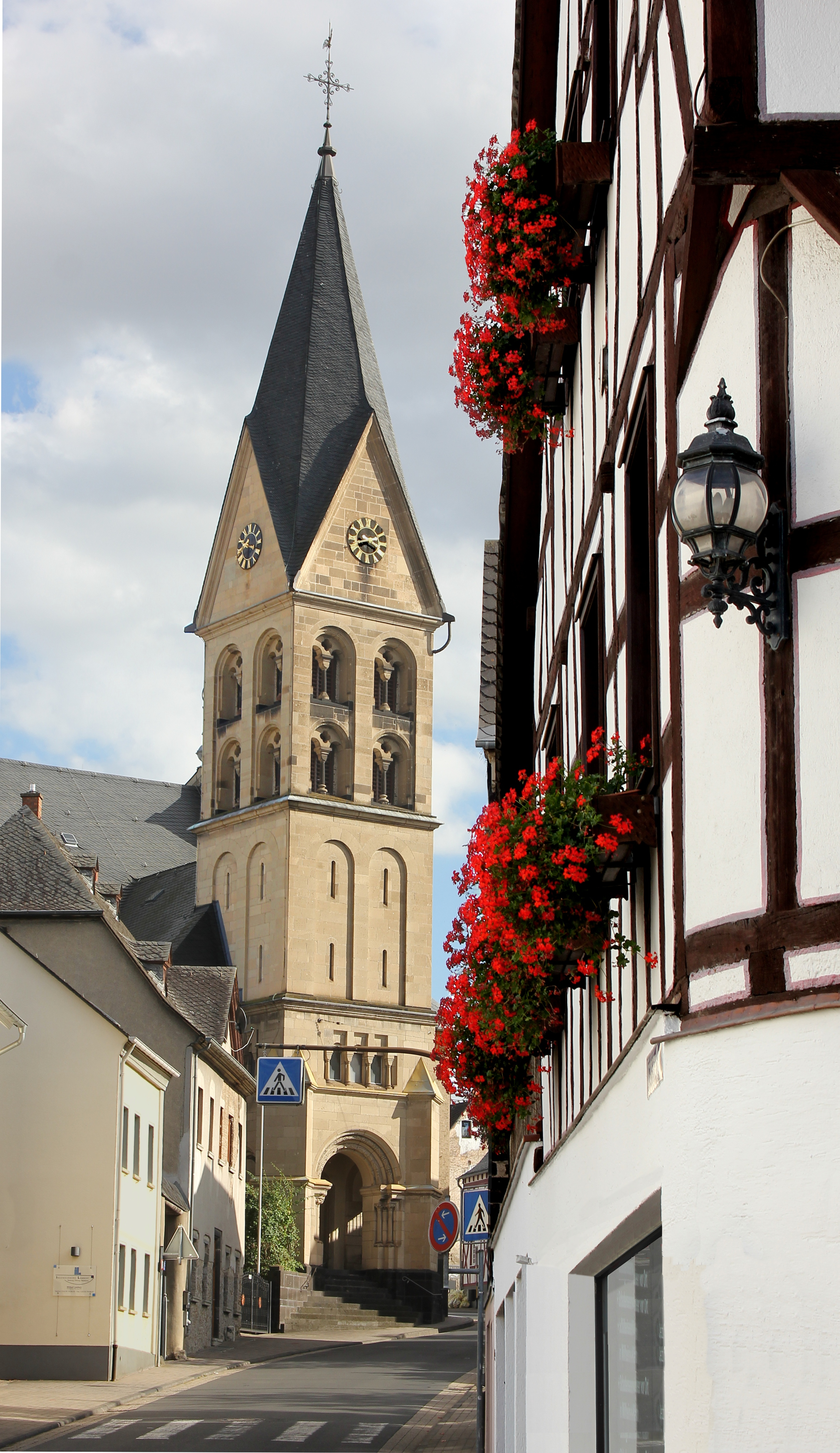 Mülheim-Kärlich: Glockenturm von St. Mauritius, 1903 erbaut, links Kirchstraße Nr. 13 und Kirchstraße Nr. 15 (ehemaliger Prälatenbau), vorn Kirchstraße Nr. 2